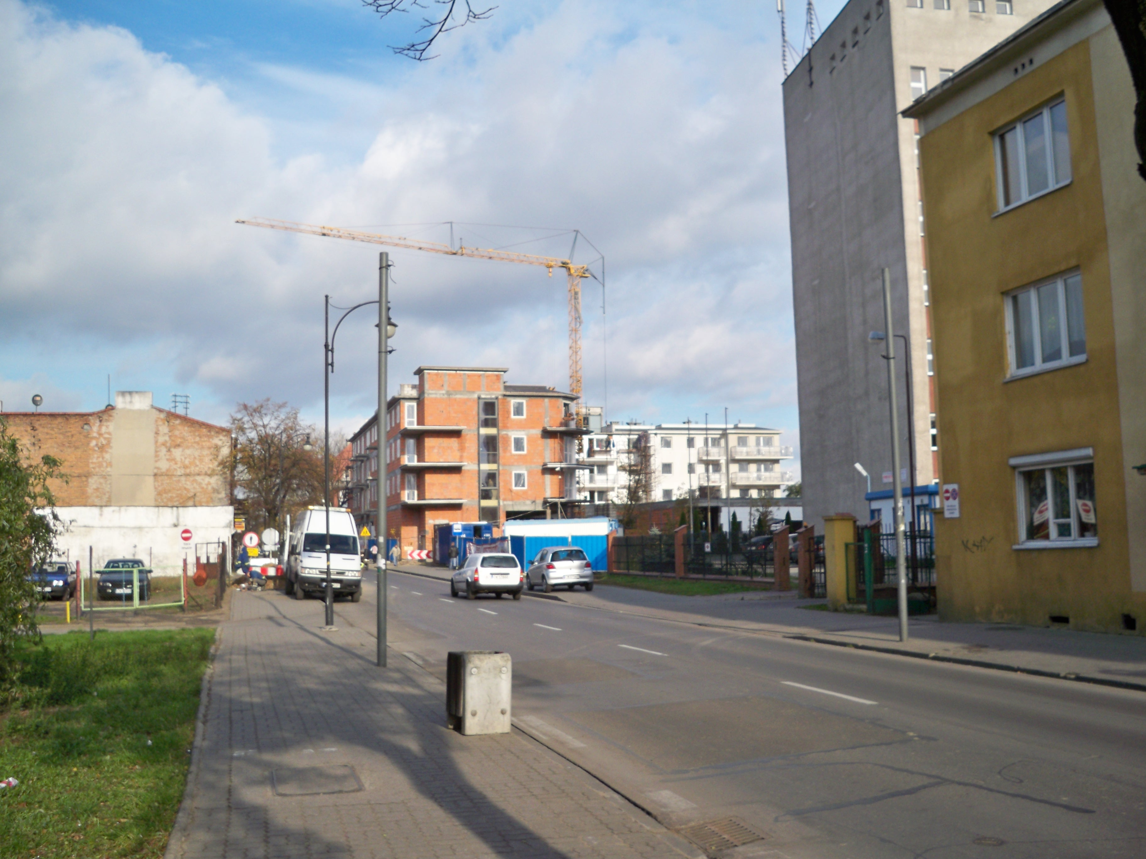 Budowa budynku przy ul. Królewieckiej 41/43 we Włocławku (2009 r.)